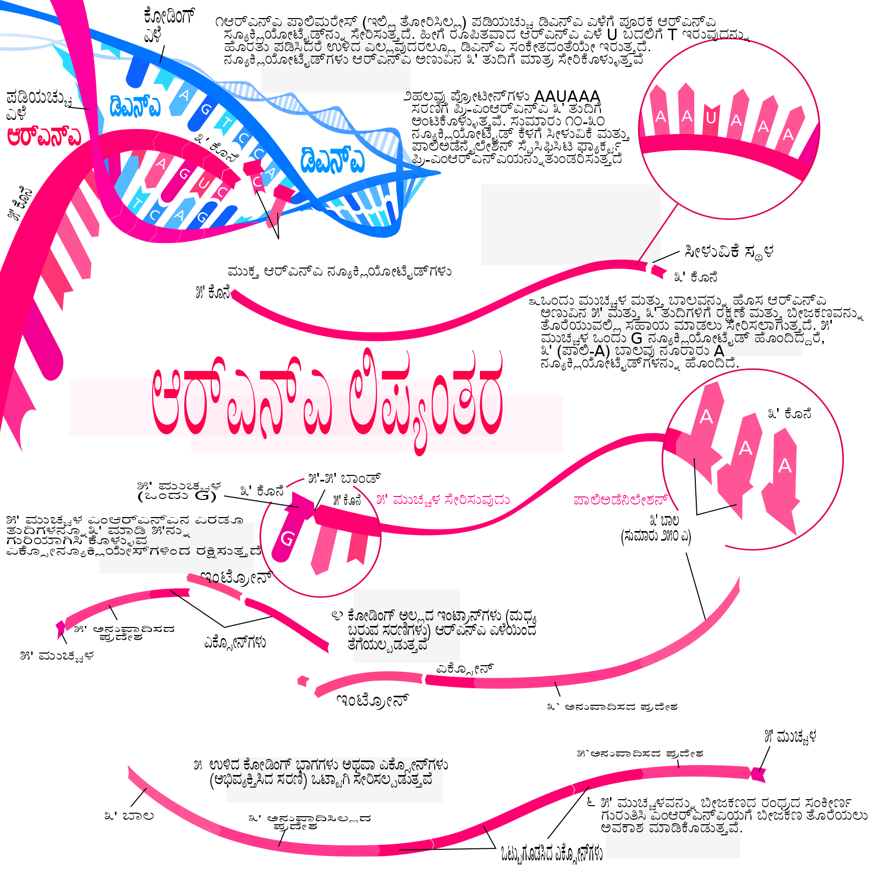 ಕನ್ನಡ: ಆರ್‌ಎನ್ಎ ಲಿಪ್ಯಂತರ ತೋರುವ ಚಿತ್ರ